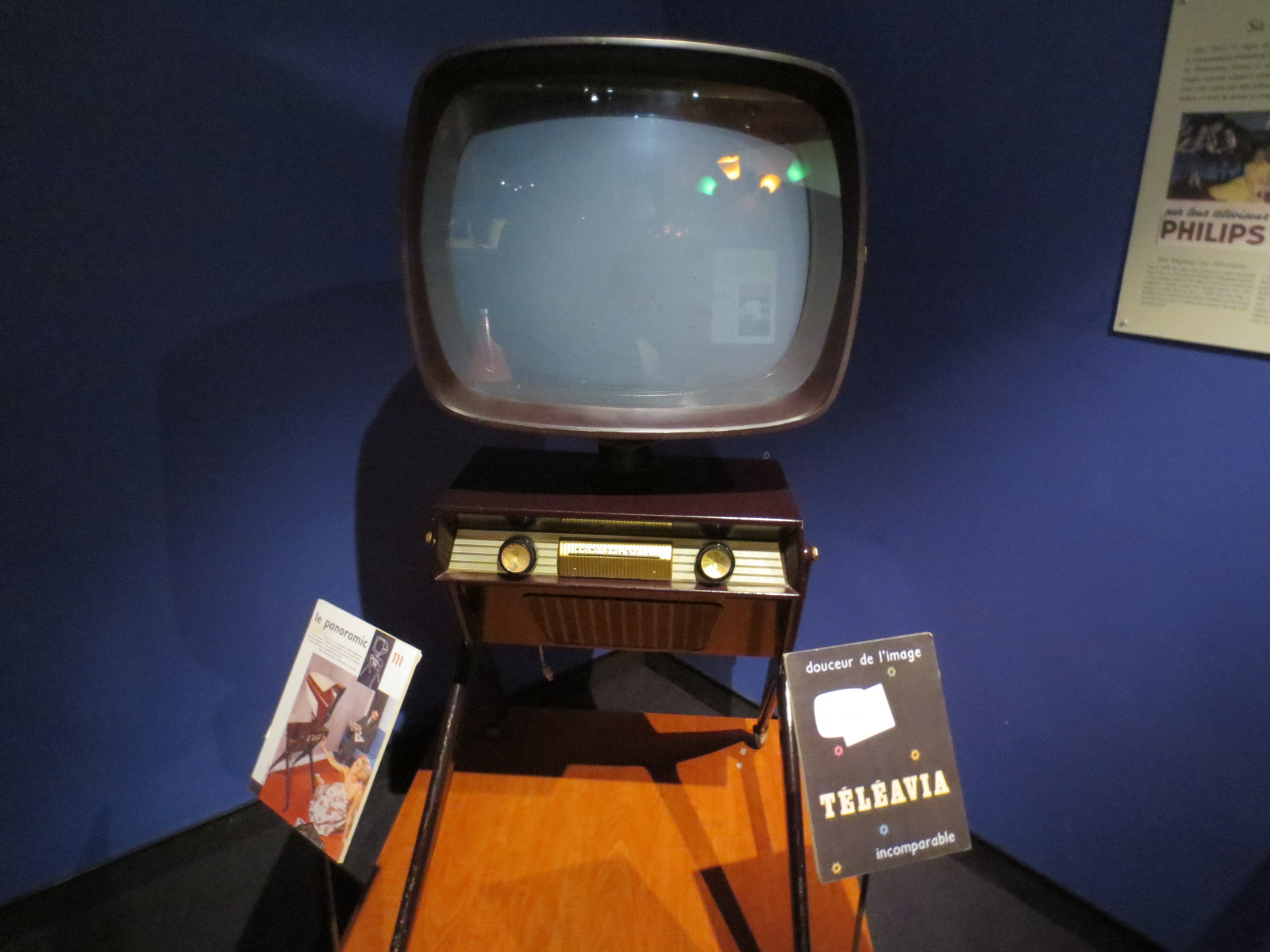 Musée EDF Electropolis : téléviseur TELEAVIA de 1957